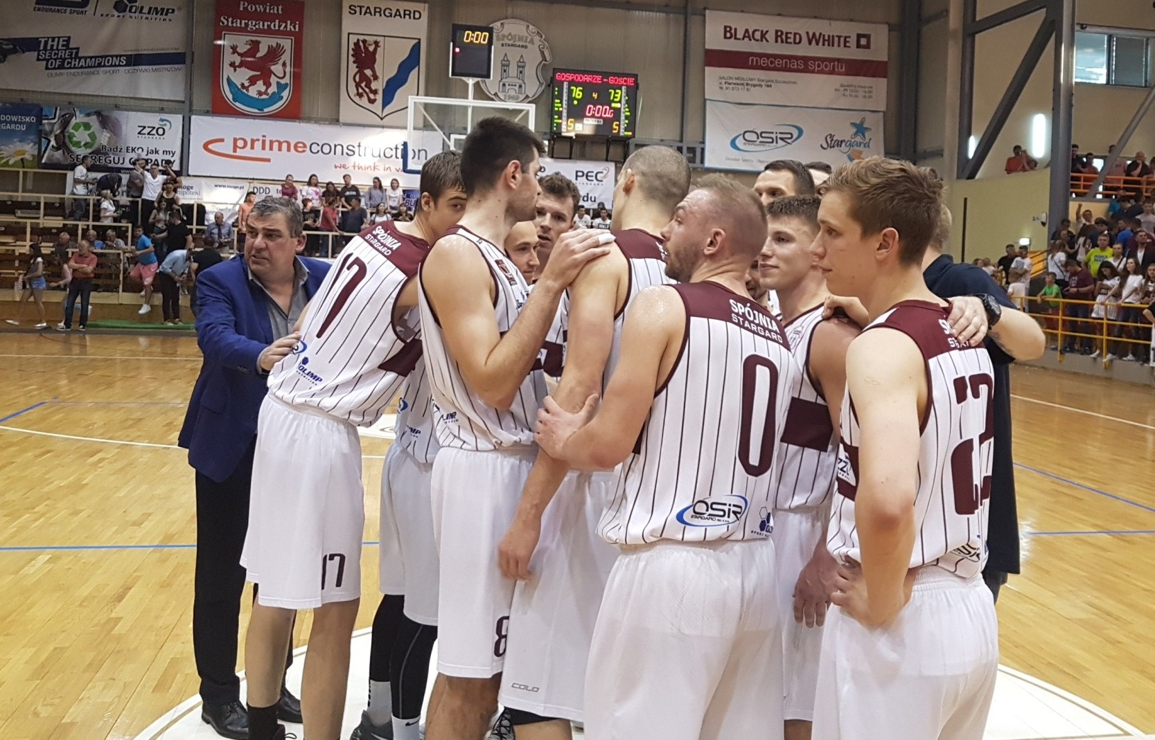 Finał. Spójnia Stargard po wygranym meczu (12.05.2018)